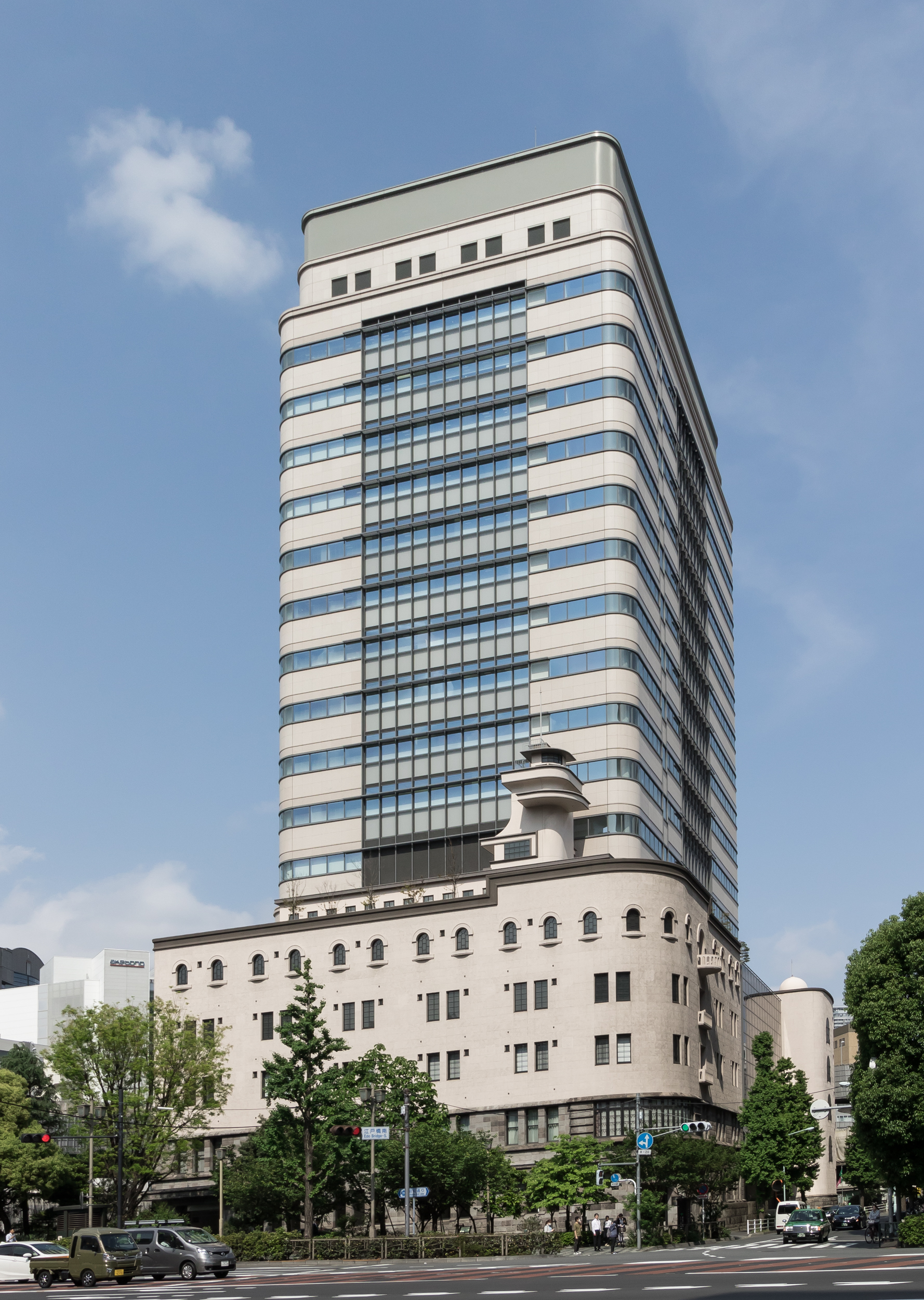 三菱ダイヤビルディング（東京都中央区）、三菱倉庫本社・じぶん銀行本社。